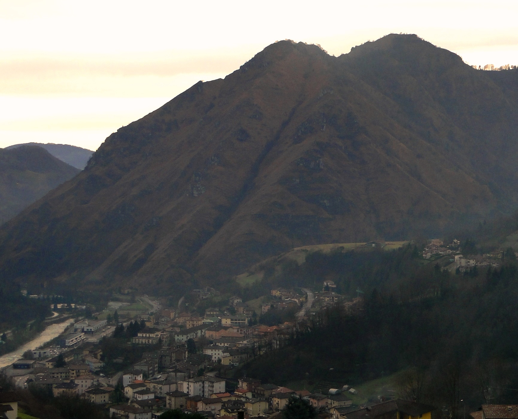 Vista di Ponte Nossa (BG) con il pizzo Frol sullo sfondo